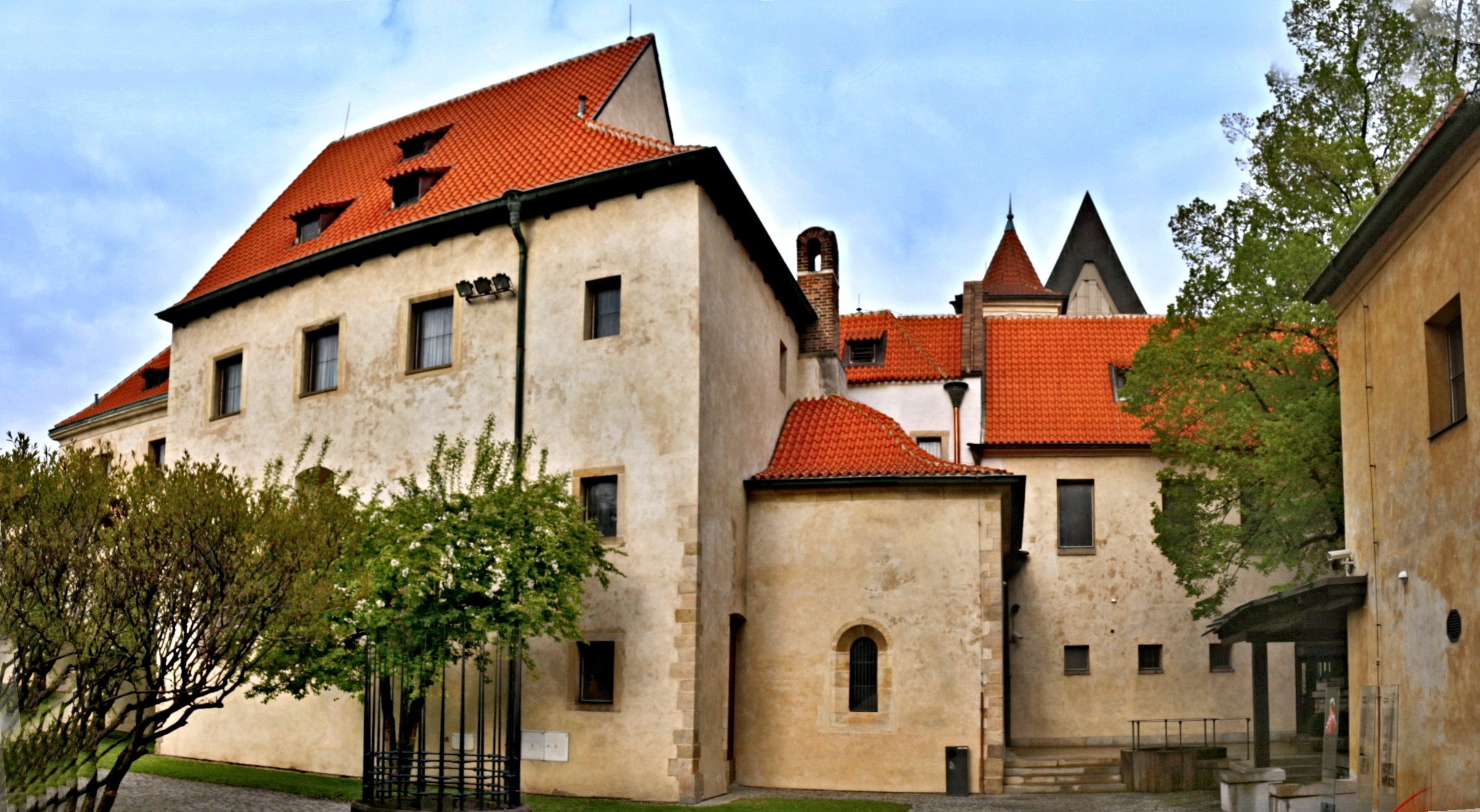 Pohřební kaple klarisek v Anežském klášteře